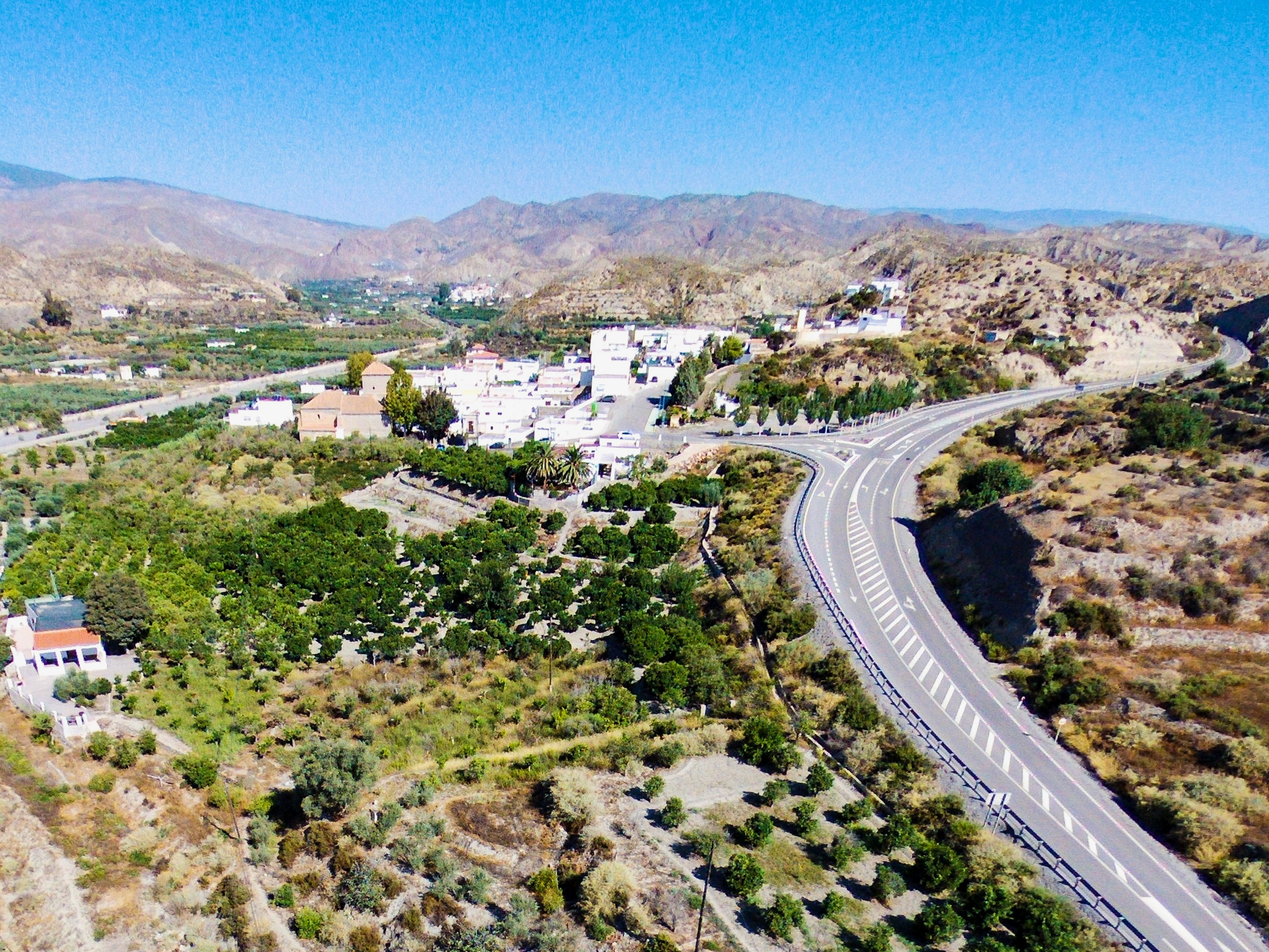 Alsodux